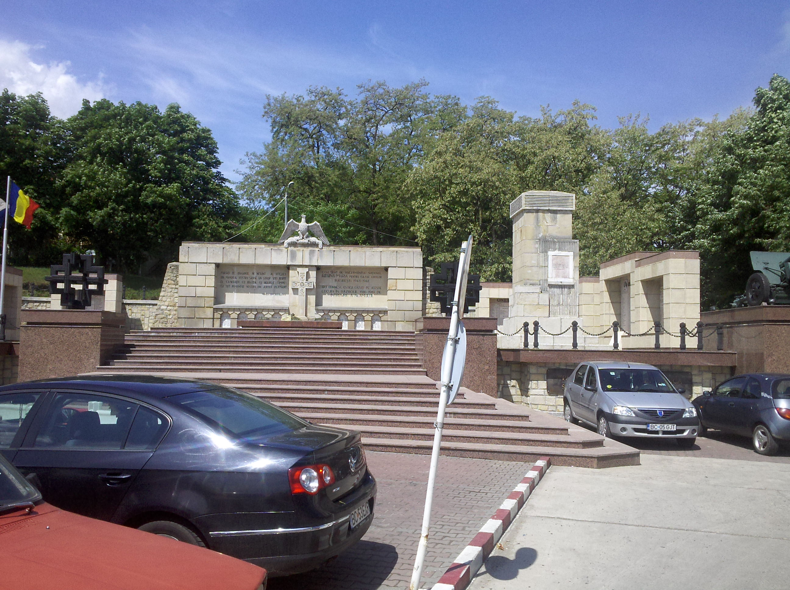 Monumentul eroilor din Oneşti.